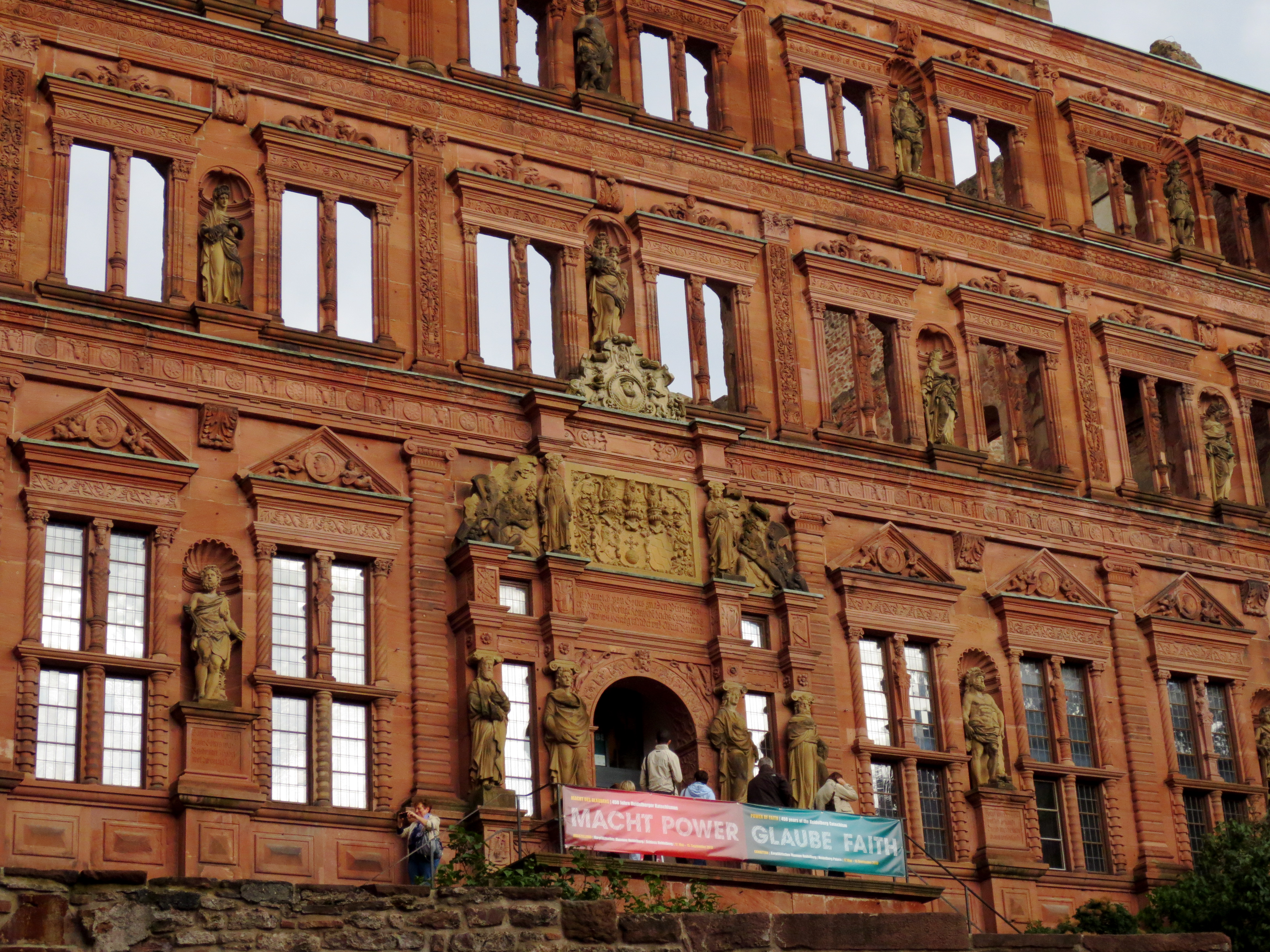 Die Fassade des im Deutsch-Französischen Erbfolgekrieges zerstörten Ottheinrichsbaus